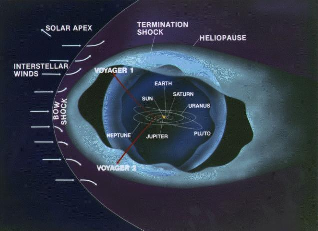 Heliopauze plaatje van NASA dus uit het publiek domein